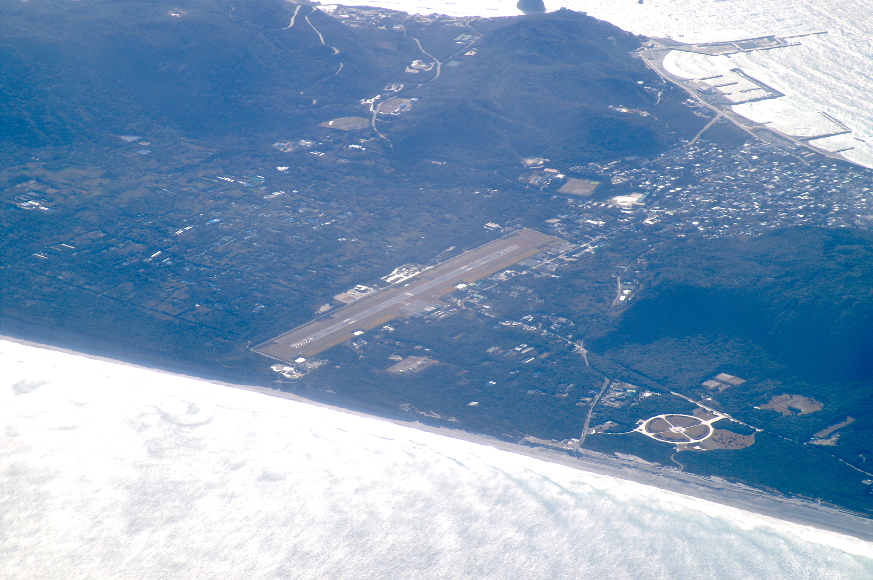 新島空港。 (2007/03/11 In Flight, NH849, Tokyo, JAPAN)